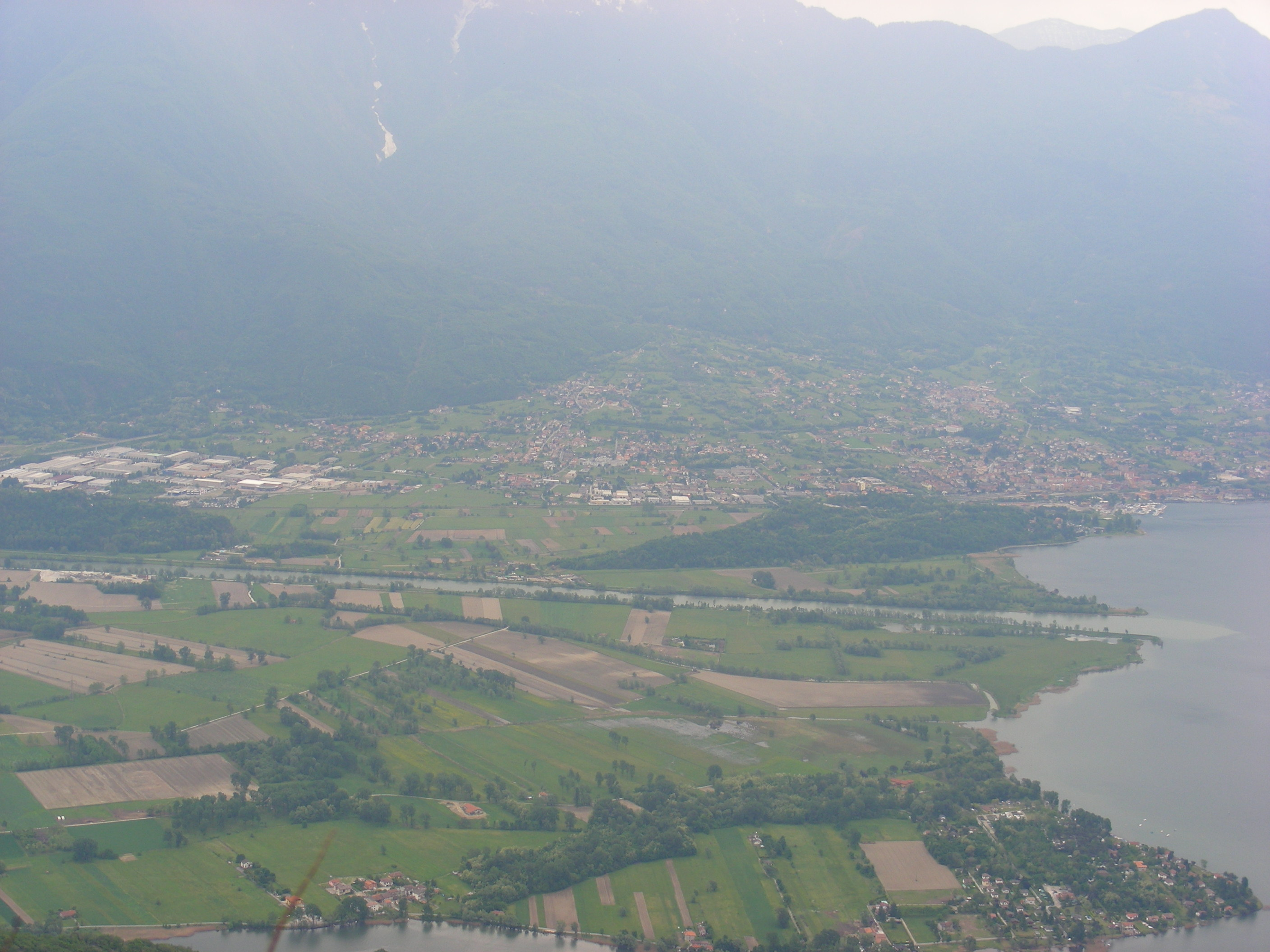 Il Pian di Spagna e la foce dell'Adda